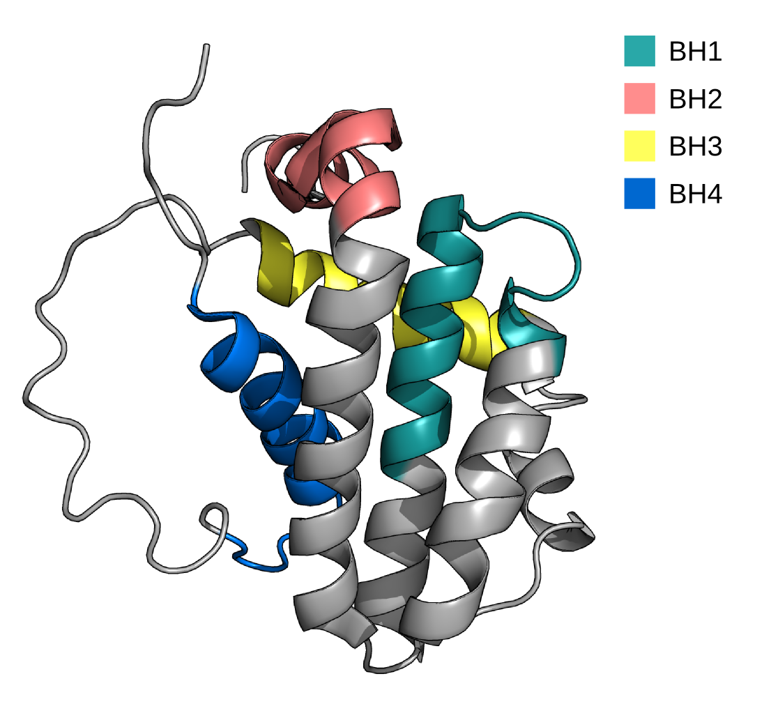 Просторова модель антиапоптоичного білка Bcl-2, позначені домени гомології Bcl: BH1-BH4